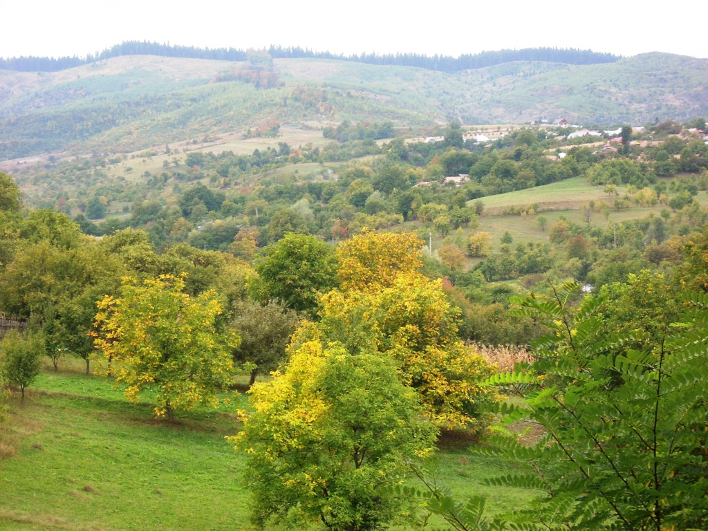 Peisaj de toamna in satul Valea Sosii